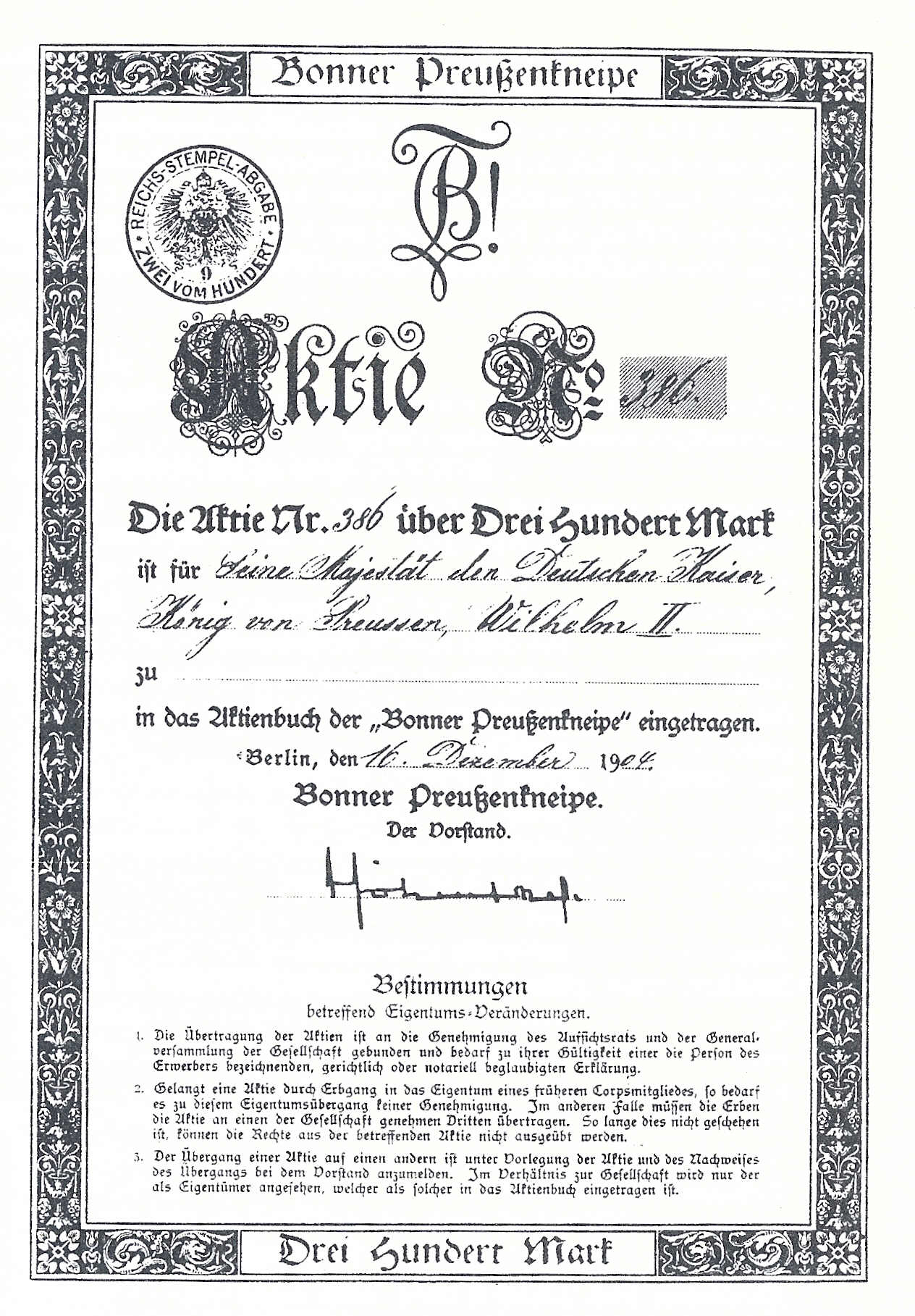 Aktie der Bonner Preußenkneipe über Drei Hundert Mark, gezeichnet von Kaiser Wilhelm II., amtliches Dokument von 1904, geringe geistige Schöpfungshöhe, Rechte abgelaufen, Public Domain